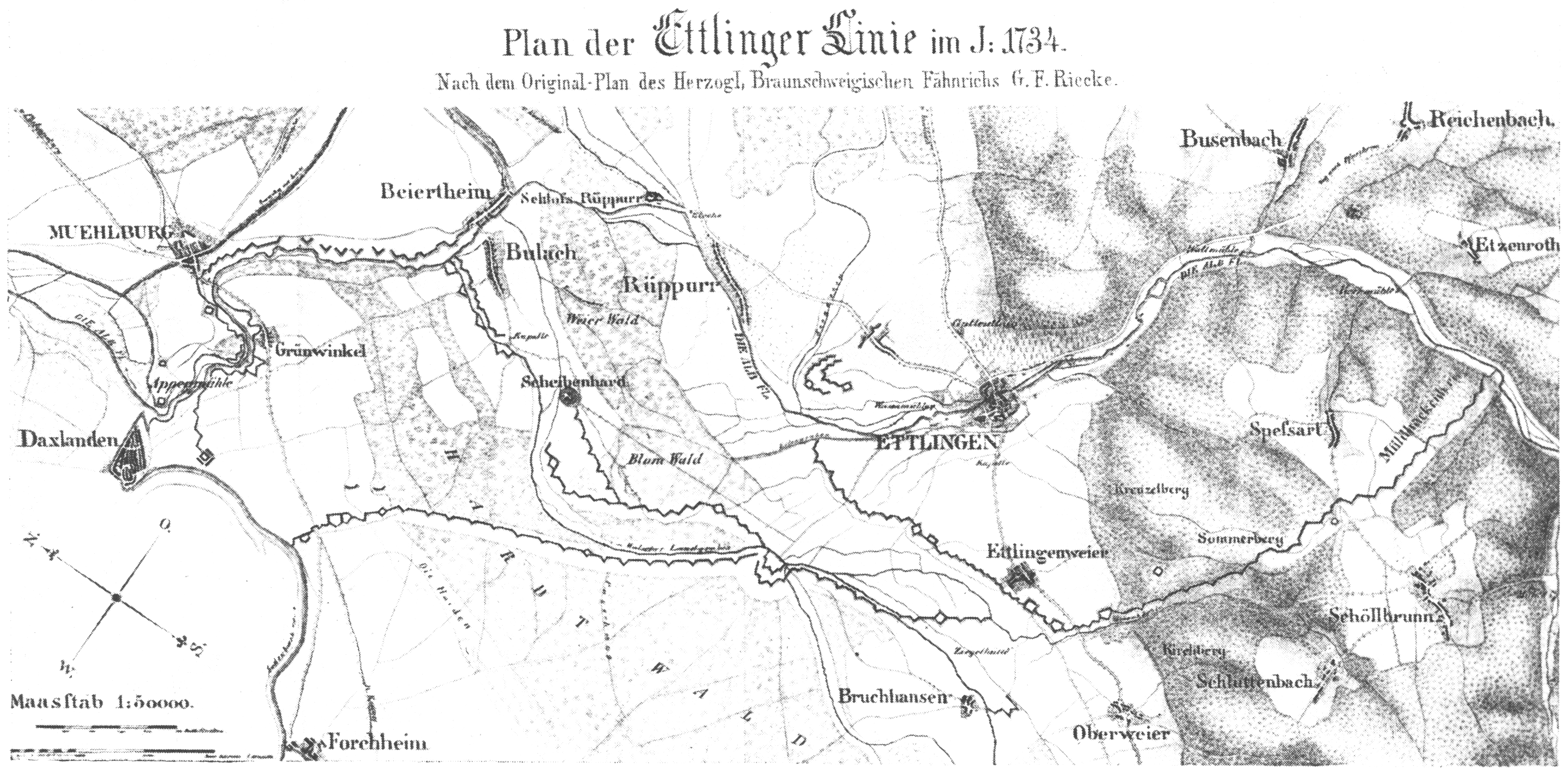 „Plan der Ettlinger Linie im J. 1734 – nach dem Original-Plan des Herzogl. Braunschweigischen Fähnrichs G[ustav] F[riedrich] Riecke“. Es handelt sich um eine drucktechnische Reproduktion in etwa halber Größe von 1907 eines (Stahl?)-Stichs, der 1857 im Badischen Militär-Almanach veröffentlicht wurde. Der Stich gibt die Orte und Straßen aus der Zeit um 1855 wieder und fügt darin die Ettlinger Linie aus dem Polnischen Thronfolgekrieg 1734 im Bereich zwischen Daxlanden und dem Albtal unterhalb Etzenrot ein.